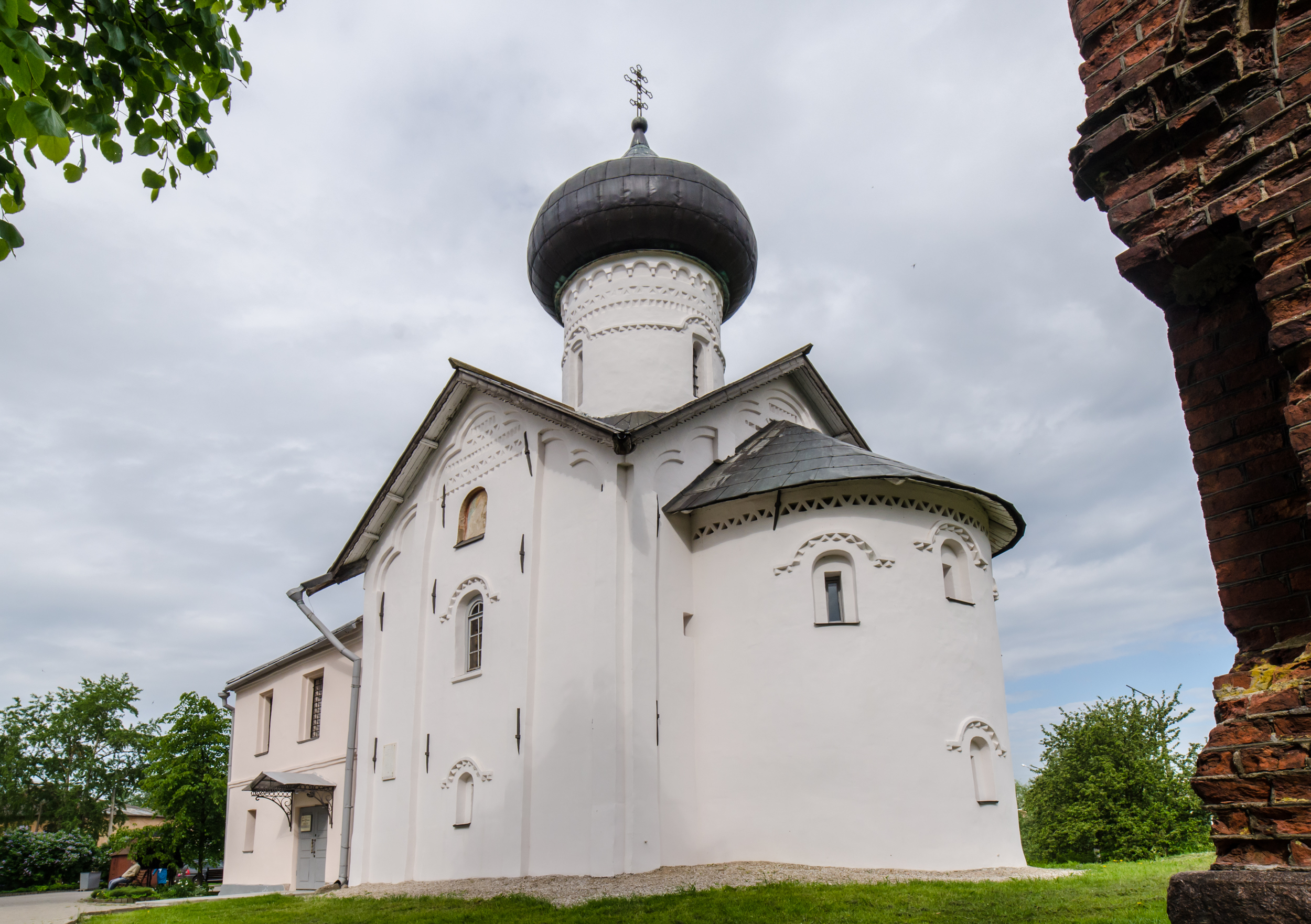 Церковь Симеона Богоприимца (и Николы Белого): улица Лазаревская, 1, Великий Новгород, Новгородская область